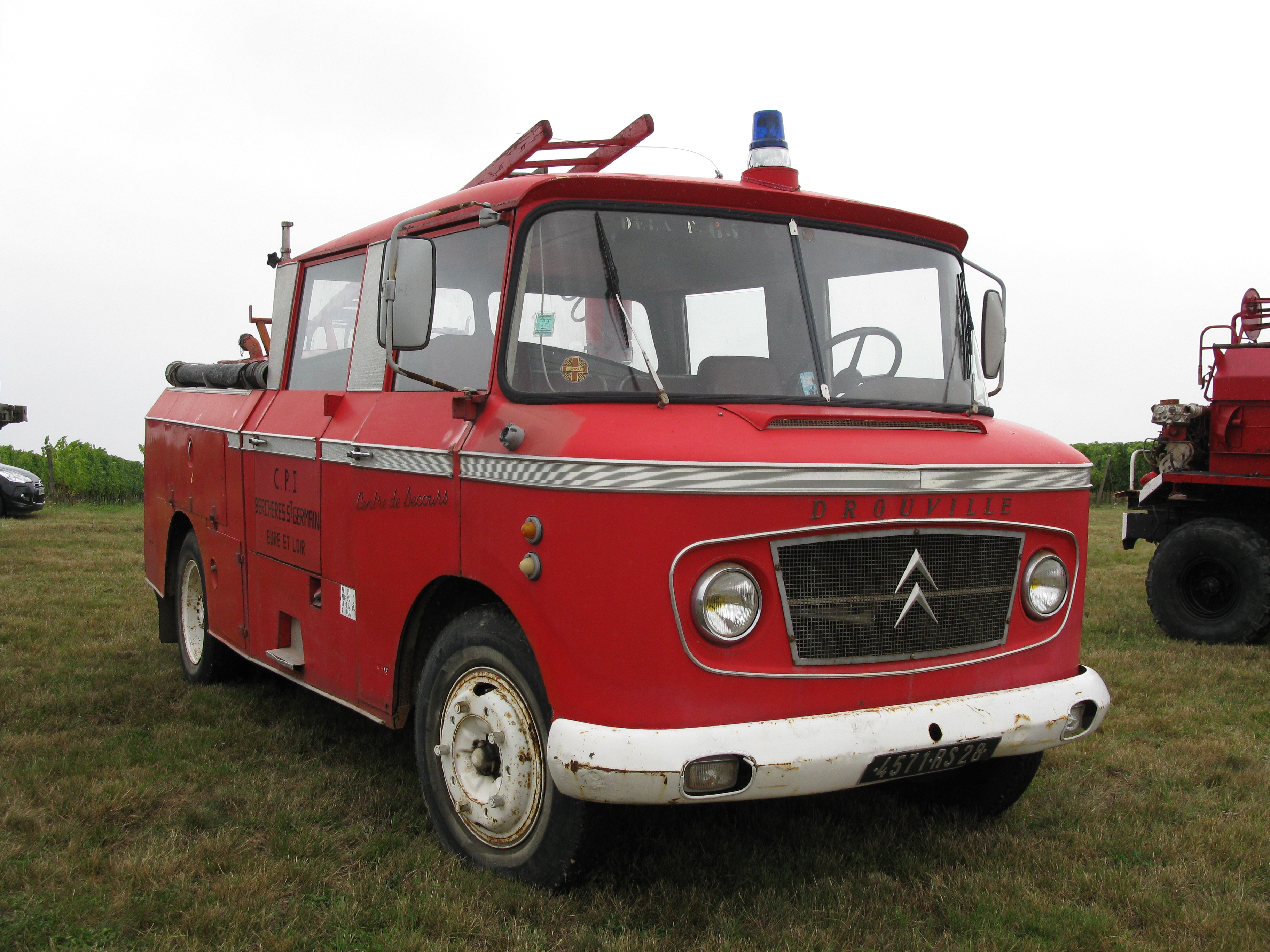 FPT - fourgon pompe tonne - 1962 "Drouville" sur Type 55. Châssis Citroën T46 CDU (Charge utile n°24).